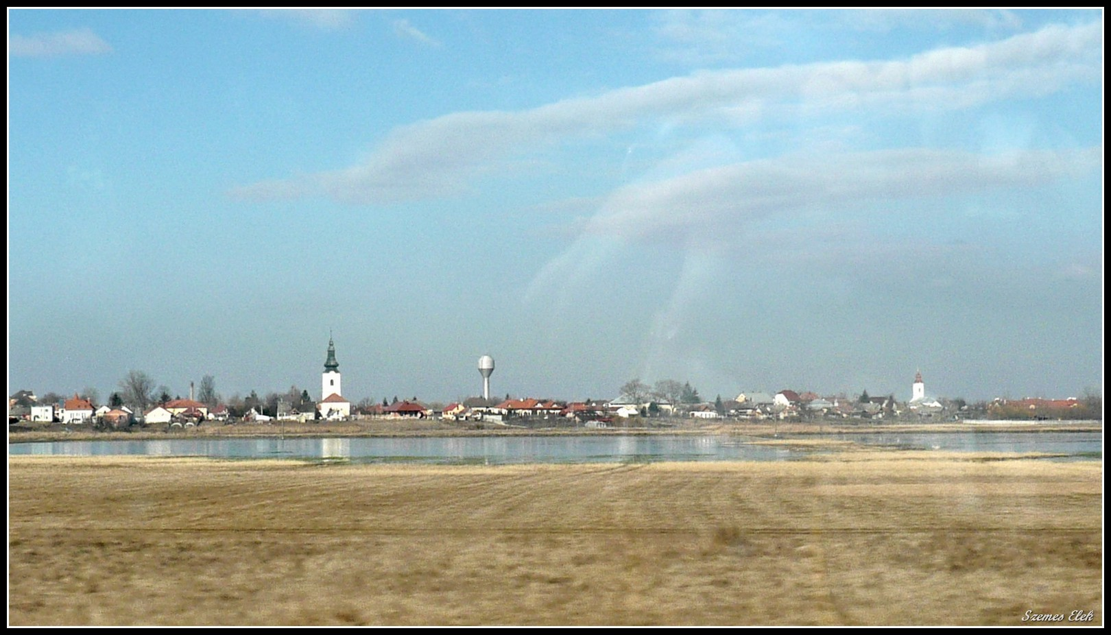 Újfehértó, Hungary